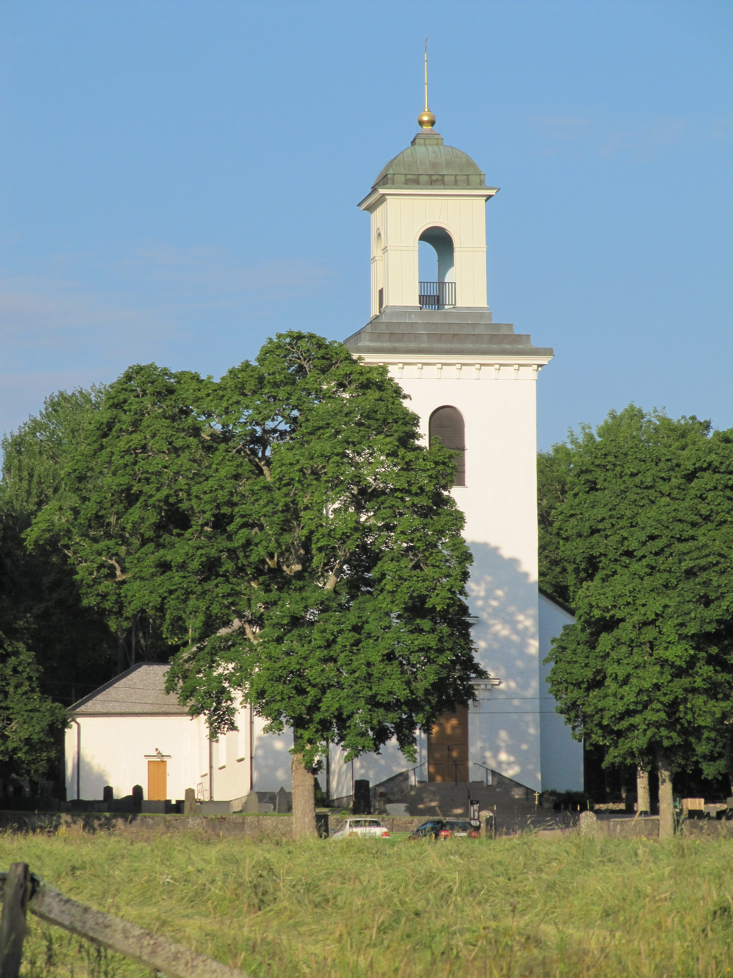 Asa kyrka